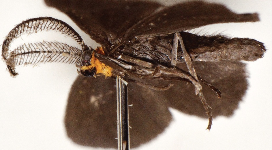 Eremonidiopsis aggregata